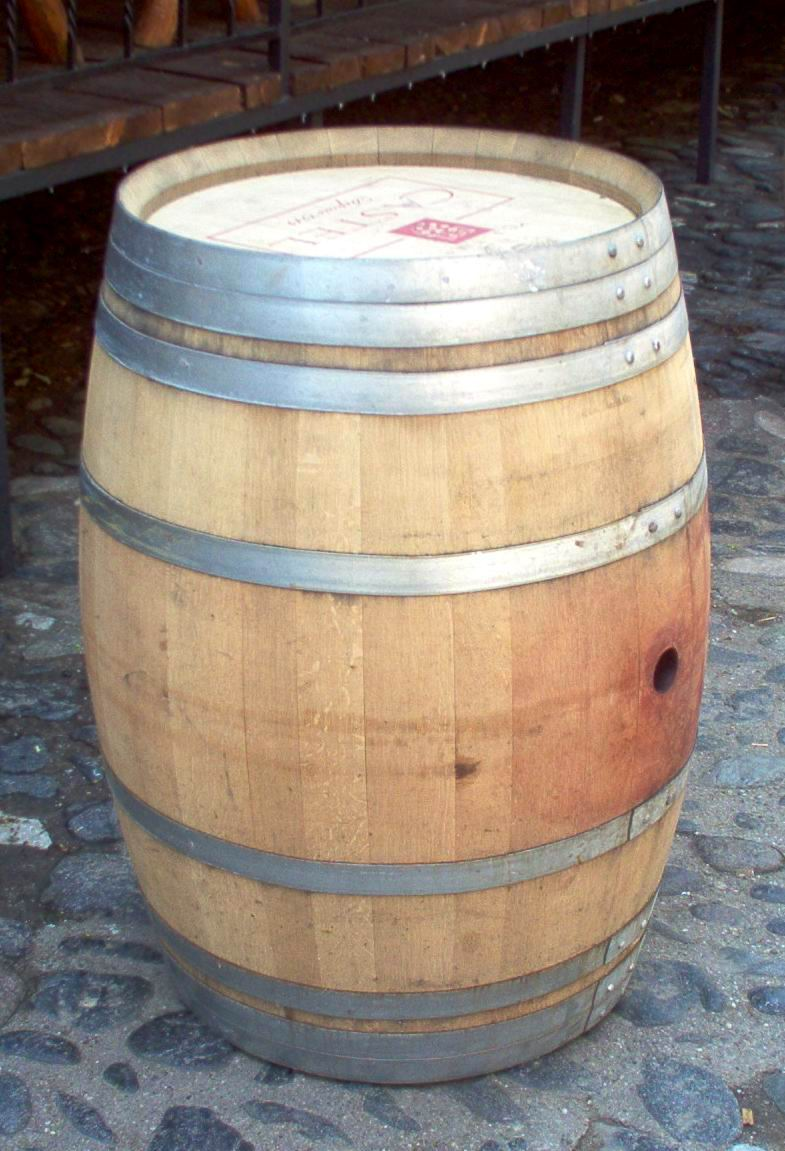 Буре производ бачвара Licensing Fotografisao Goldfinger. U javnoj upotrebi!